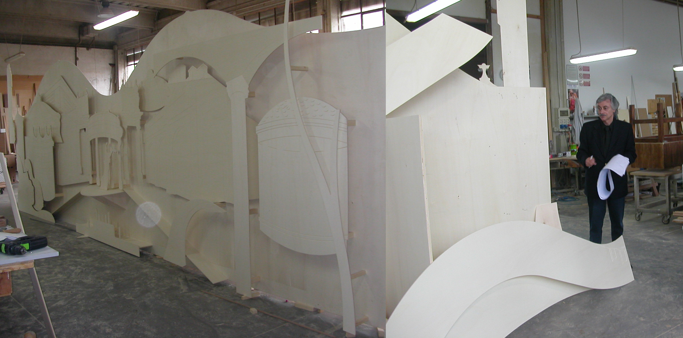 Installazione Grande Opera (Montecatini Terme)